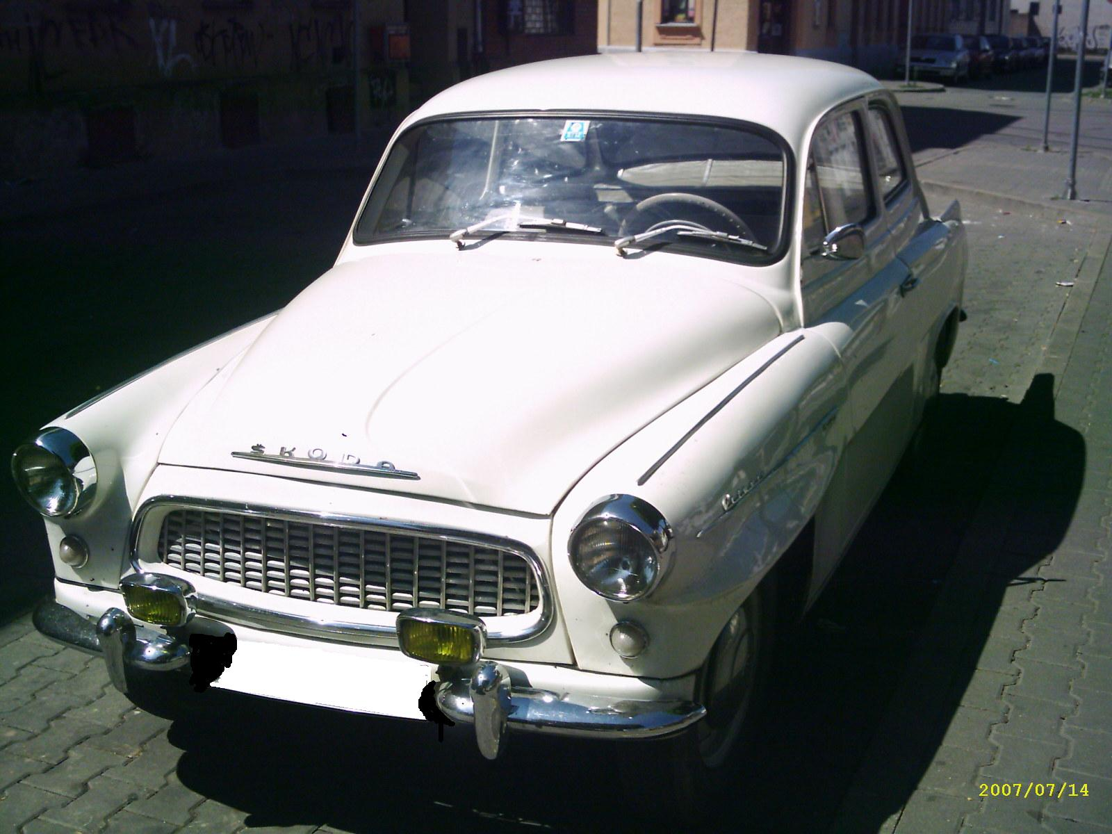 Škoda Octavia type 702 (since 1961)